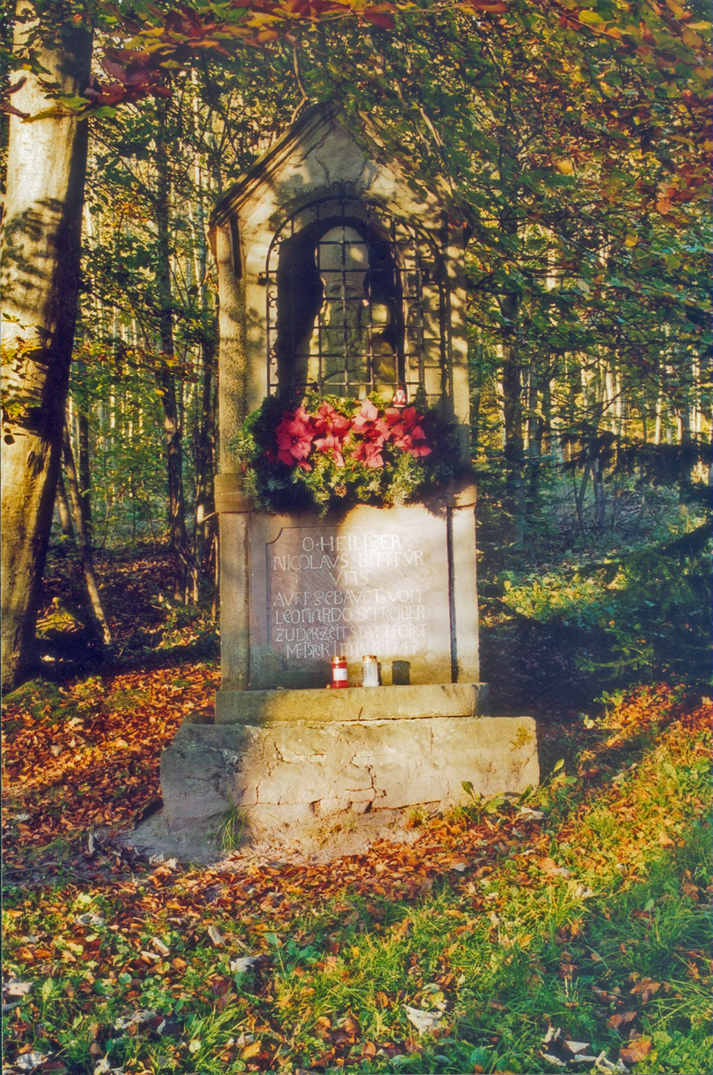 St. Nikolaus Bildstock aus dem Jahr 1747 auf ca. 470 m Höhe, in der Nähe von Drei Eichen, Heidelberg